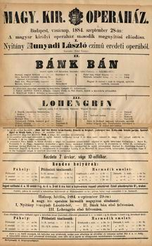 Az Operaház második megnyitójának plakátja (1884)